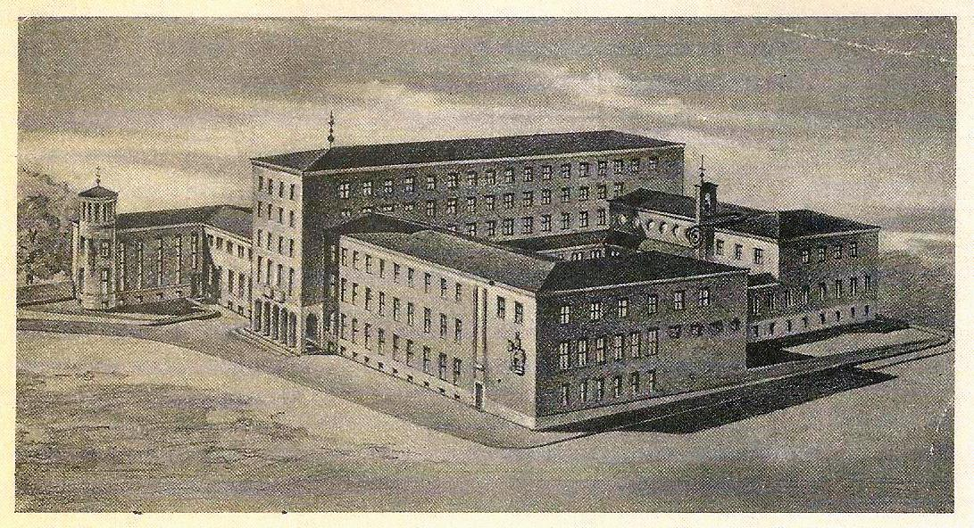 Scan einer alten Postkarte mit dem alten Priesterseminar Aachen